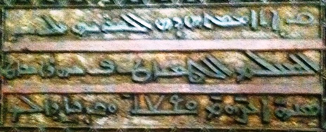 Partie Gauche de la gravure sur bois de l'achèvement de la séparation des sections hommes/femmes de l'église Saint Awtel, Kfarsghab, Liban